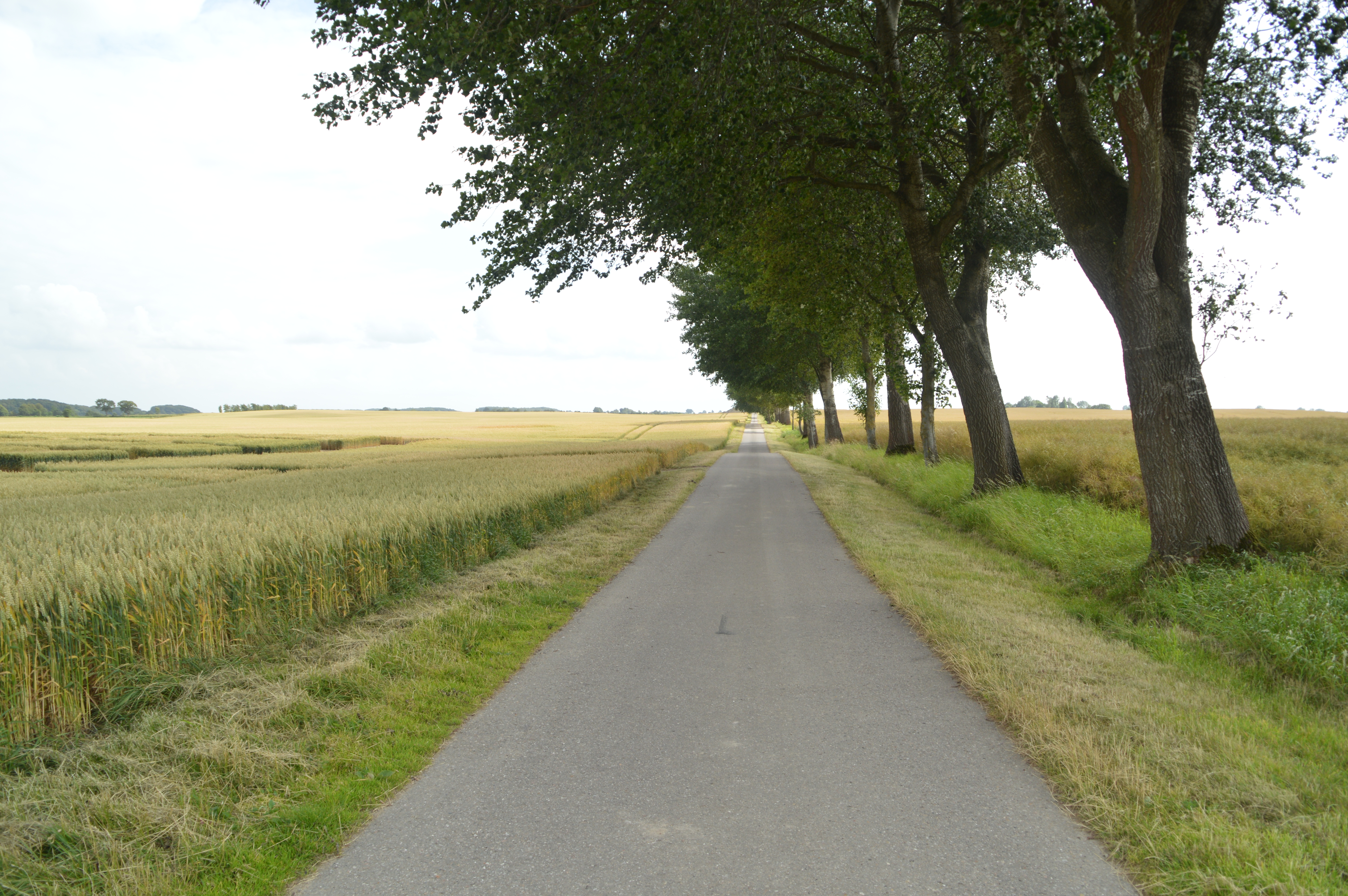 Allee in Loit